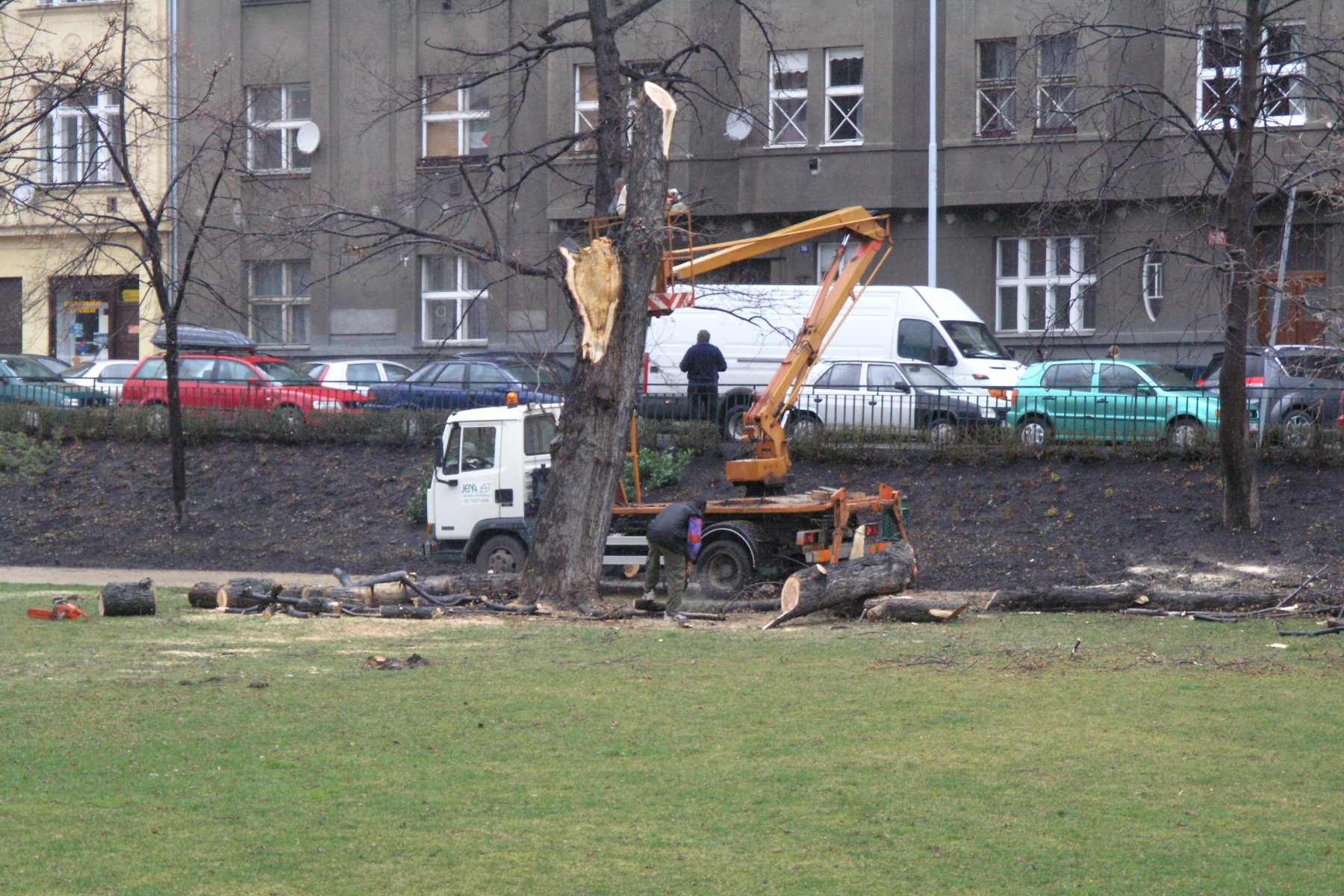 Praha, park Porthaimka - odklízení následků vichřice Emma